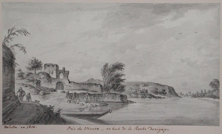 Jean-Jacques Delusse est un dessinateur et peintre français né à Paris le 14 mars 1758, mort à Saintes le 28 novembre 1833.